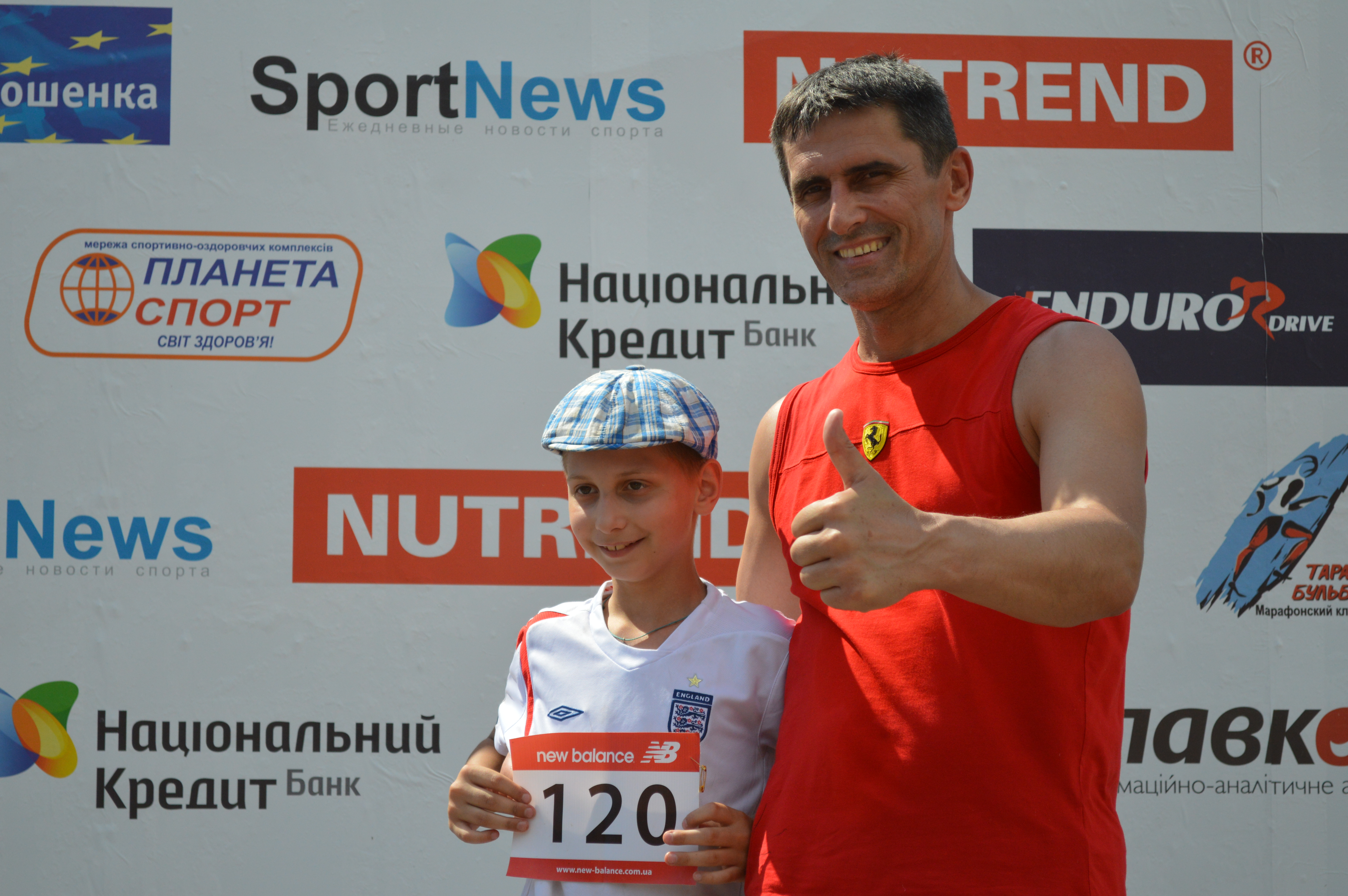 Віталій Ярема організував і проводив в Дарницькому районі міста Києва - спортивний захід - Марафон "Здоров'я". фото 2012 року.